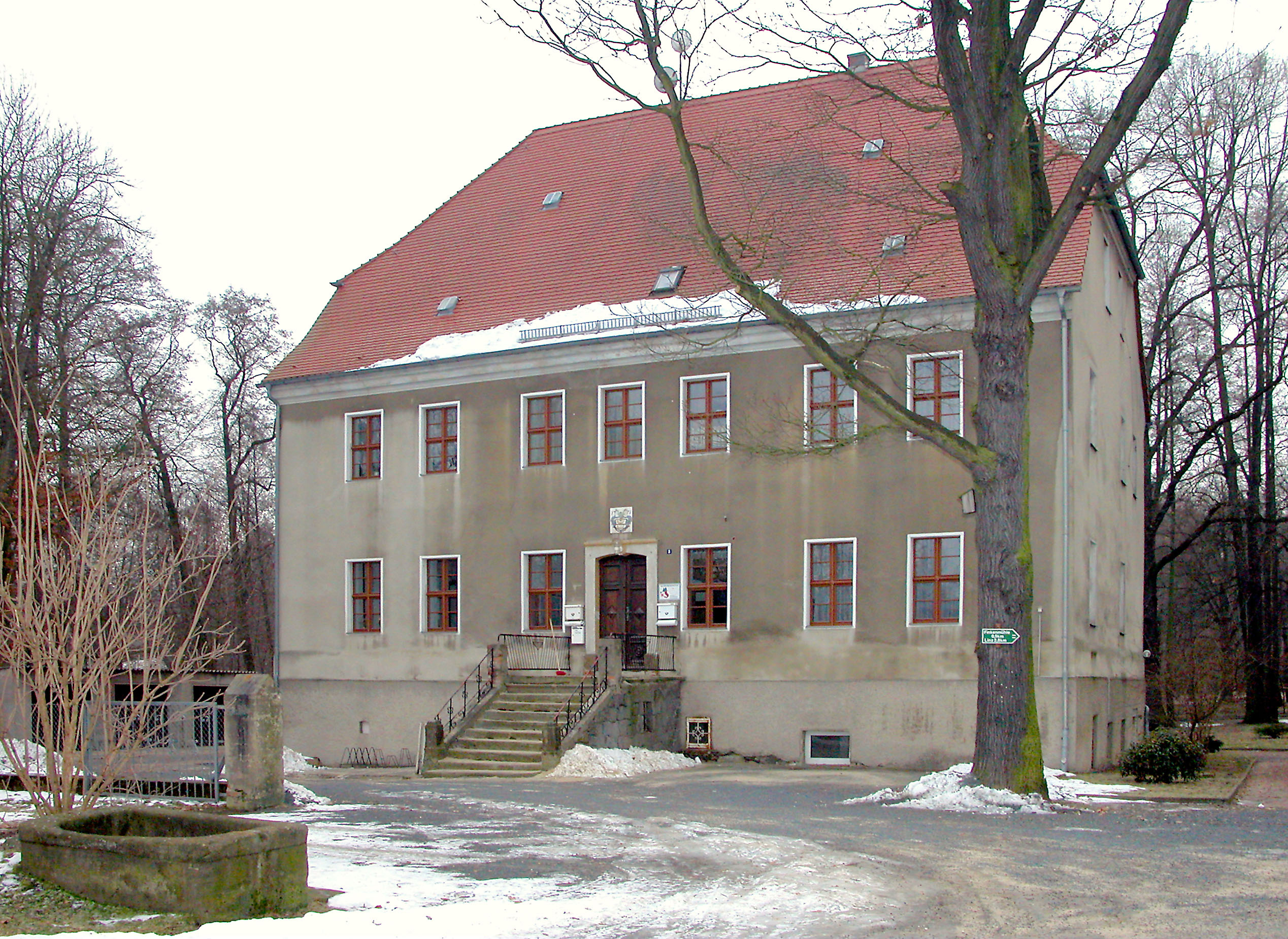 01.02.2006 01561 Kraußnitz (Schönfeld), Finkenmühlenweg 3 (GMP: 51.360683,13.759115): Barockes Herrenhaus des ehemaligen Rittergutes. Eingangsseite. 1771 errichtet von den Brüdern Friedrich Alexander und Christian Gottlieb von Süßmilch, genannt Hörnig. 1990 für die Gemeideverwaltung saniert. Obergeschoß Wohnungen. [DSCN8642.TIF]20060201040DR.JPG(c)Blobelt